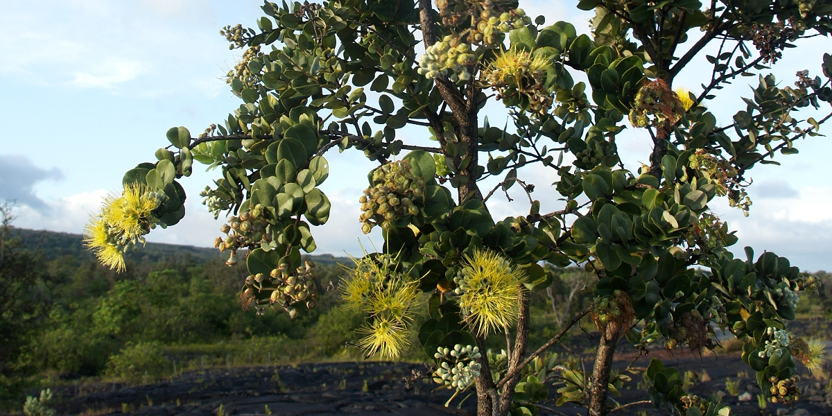 Остров Гвайи. Иллюстрация Второва И.П. для учебника Гавайеведение.